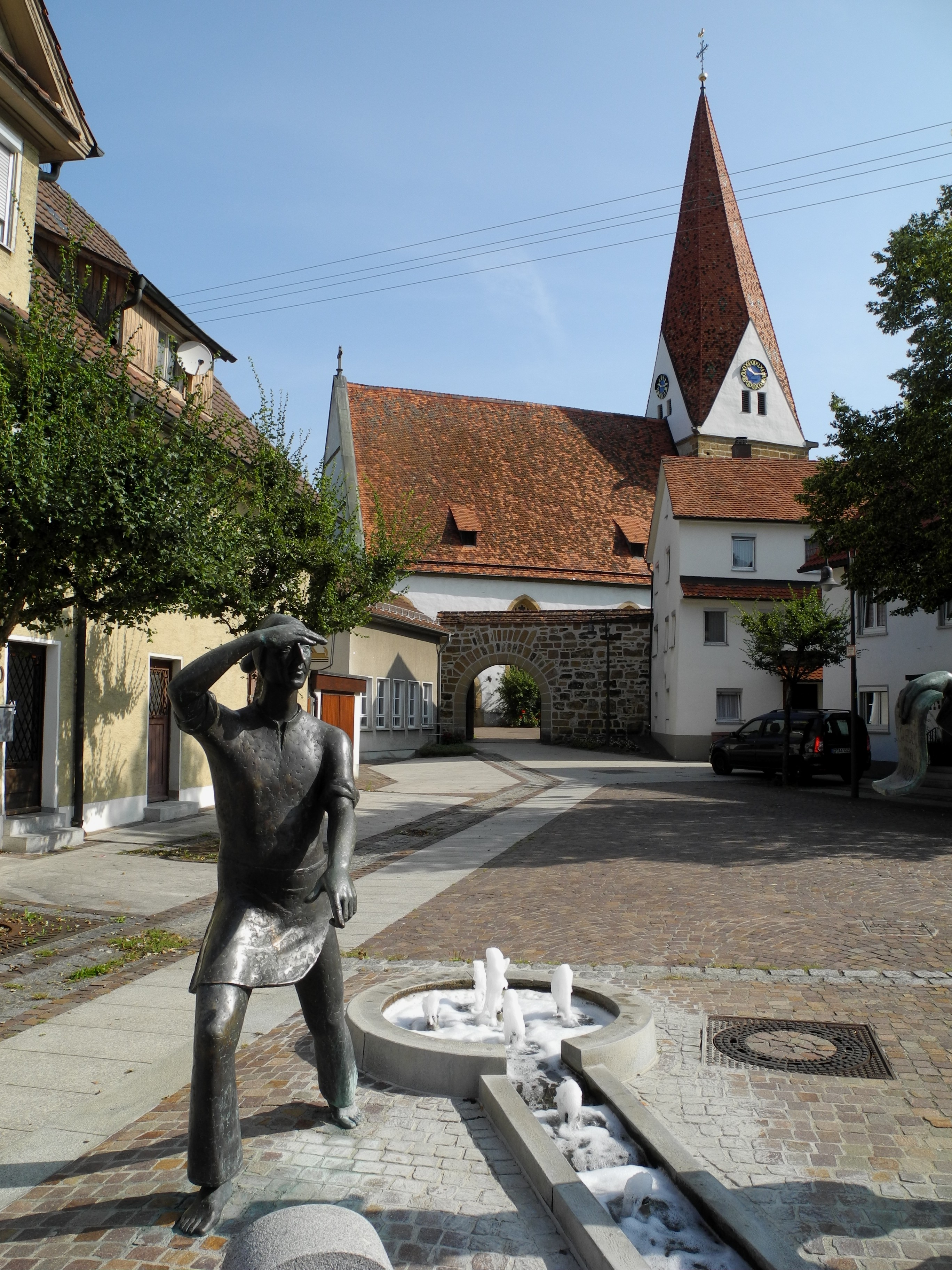 Gingen an der Fils - Johanneskirche ab 984, Brunnen